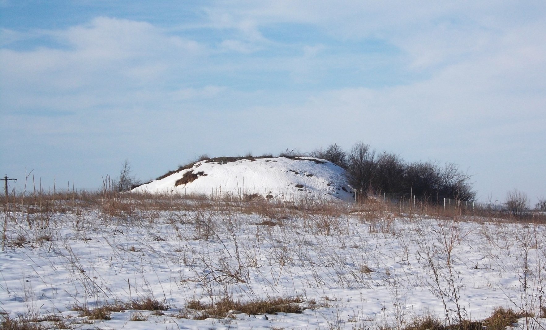 Tumul 03